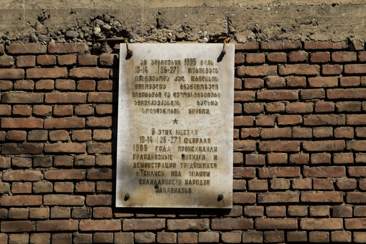 GEO_3095